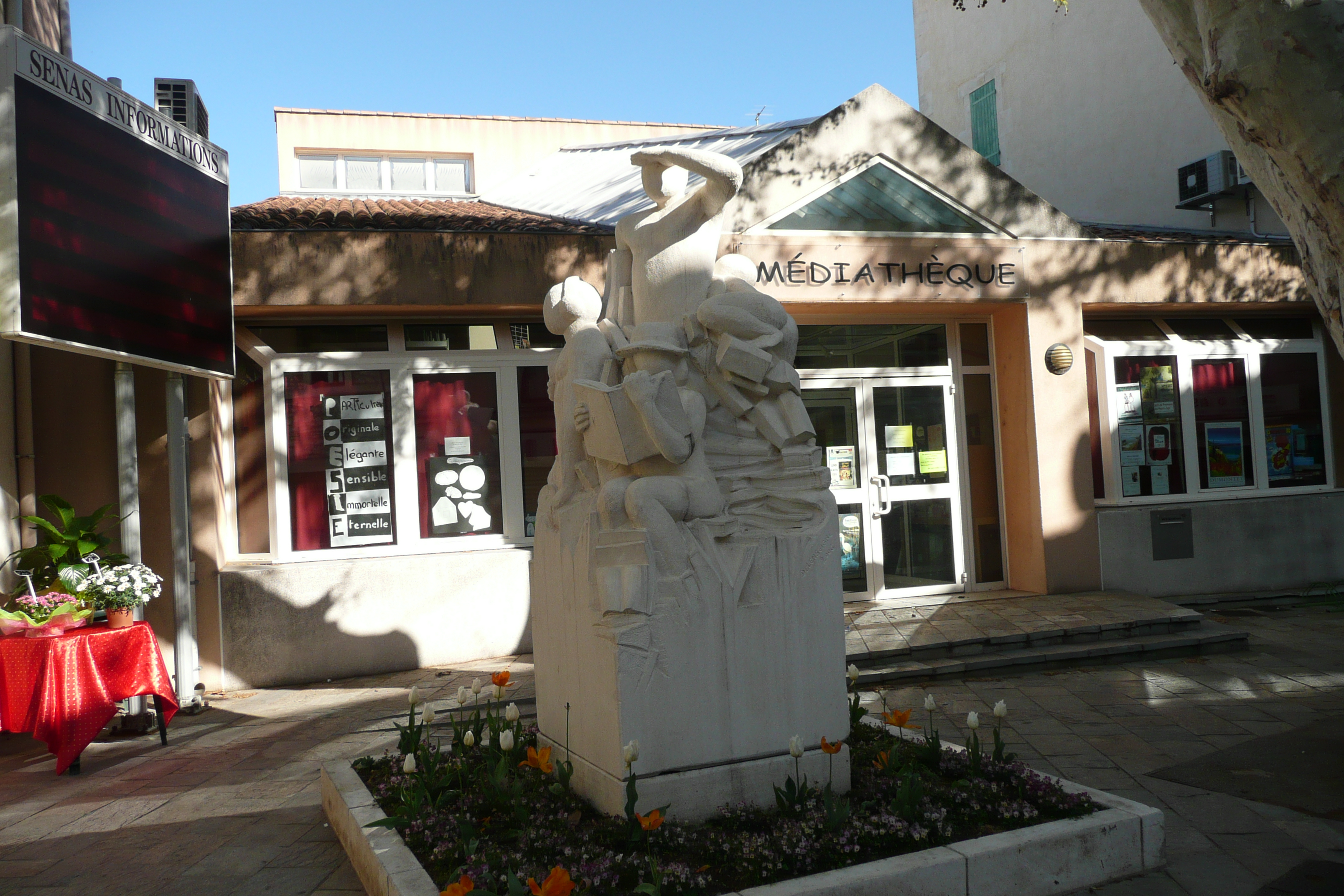 Médiathèque à Sénas.